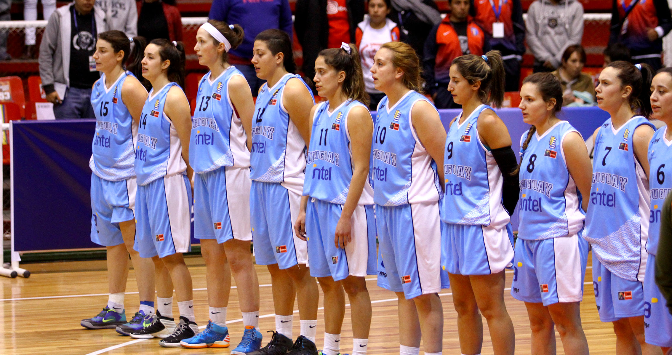 Ambato (Tungurahua) 14 de agosto de 2014 (Andes).- Campeonato Sudamericano de baloncesto Femenino Ambato 2014. Ecuador (amarillo) vs Uruguay (celeste).